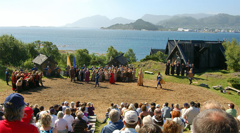 Herøyspiel Kongens Ring